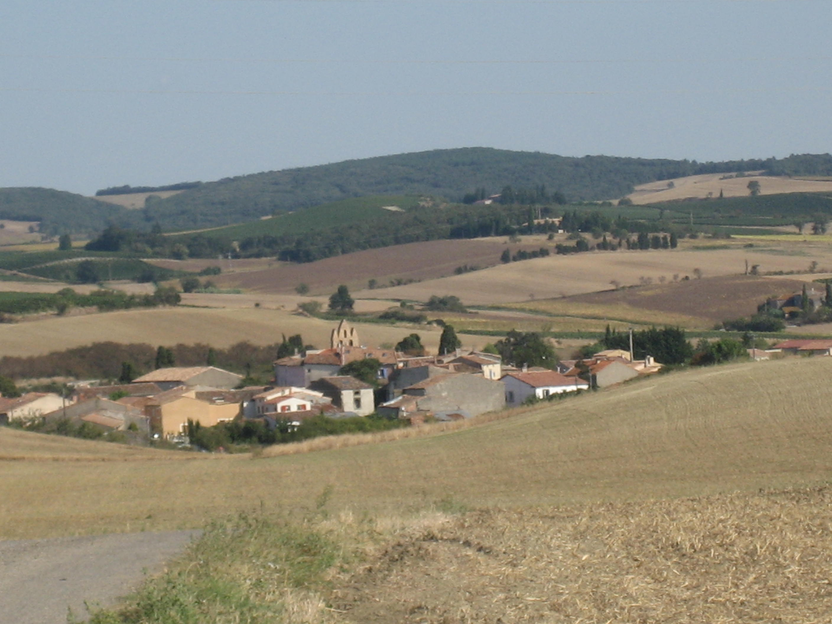 Villeneuve-lès-Montréal en septembre 2009.